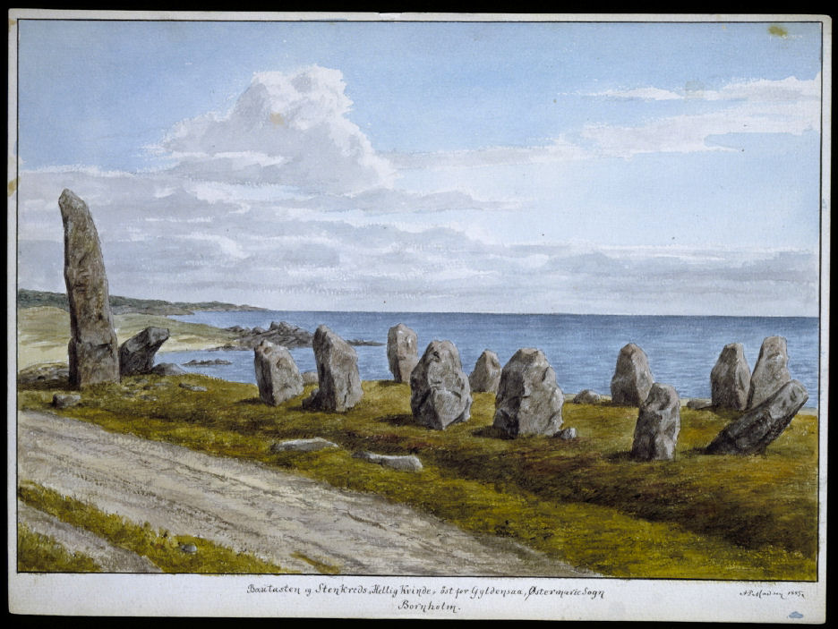 A. P. Madsens akvarel fra 1885. Bautasten og stenkreds ved "Hellig kvinde" øst for Gyldensaa, Øster Marie sogn, Bornholm.